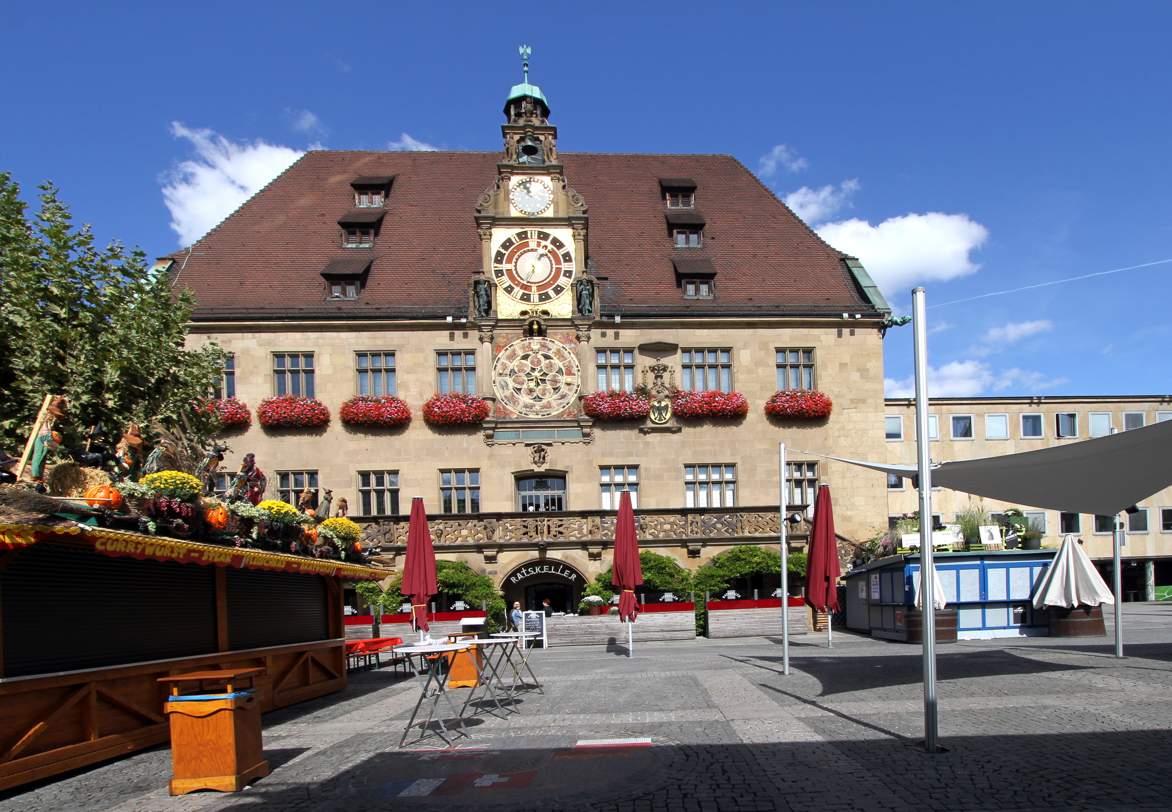 Heilbronn